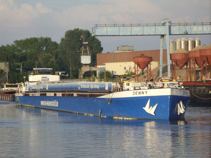 MS WISSENSCHAFT / 2014 in Oldenburg / Ausstellung „Digital“